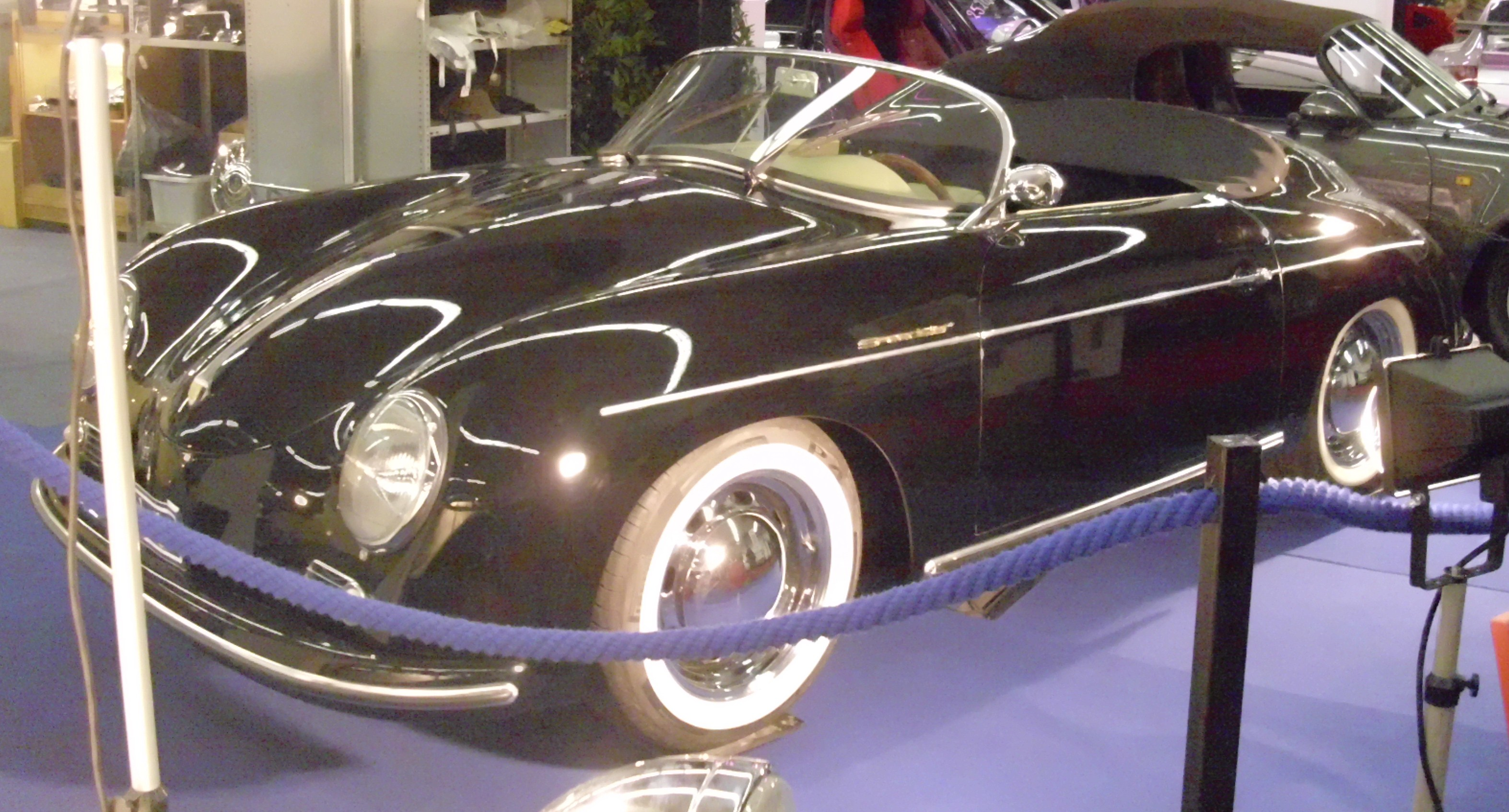 Scheib Speedster CCS (Replika)